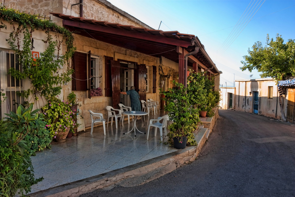 Neo Chorio IMG_0043.jpg